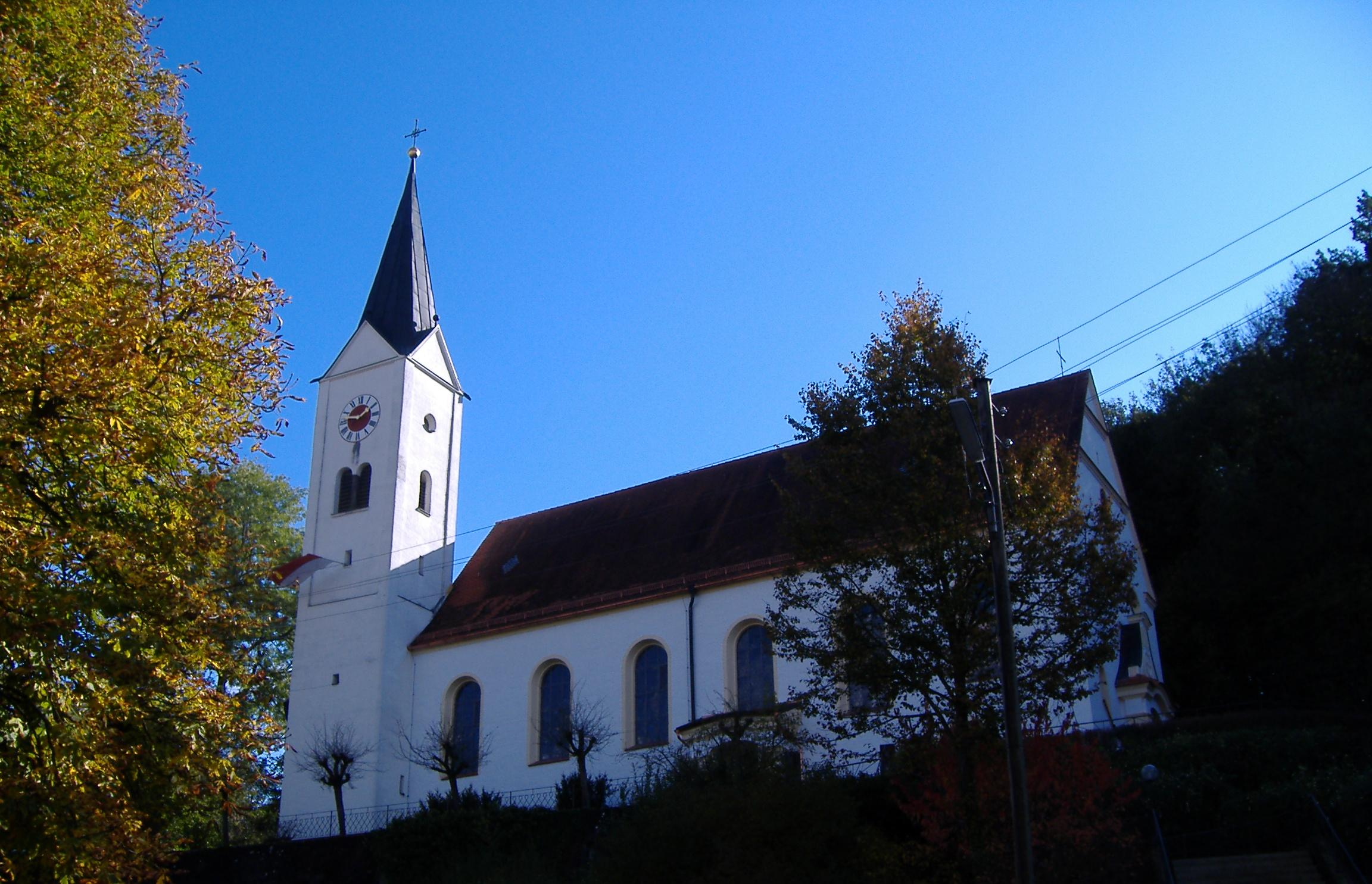 Binswangen